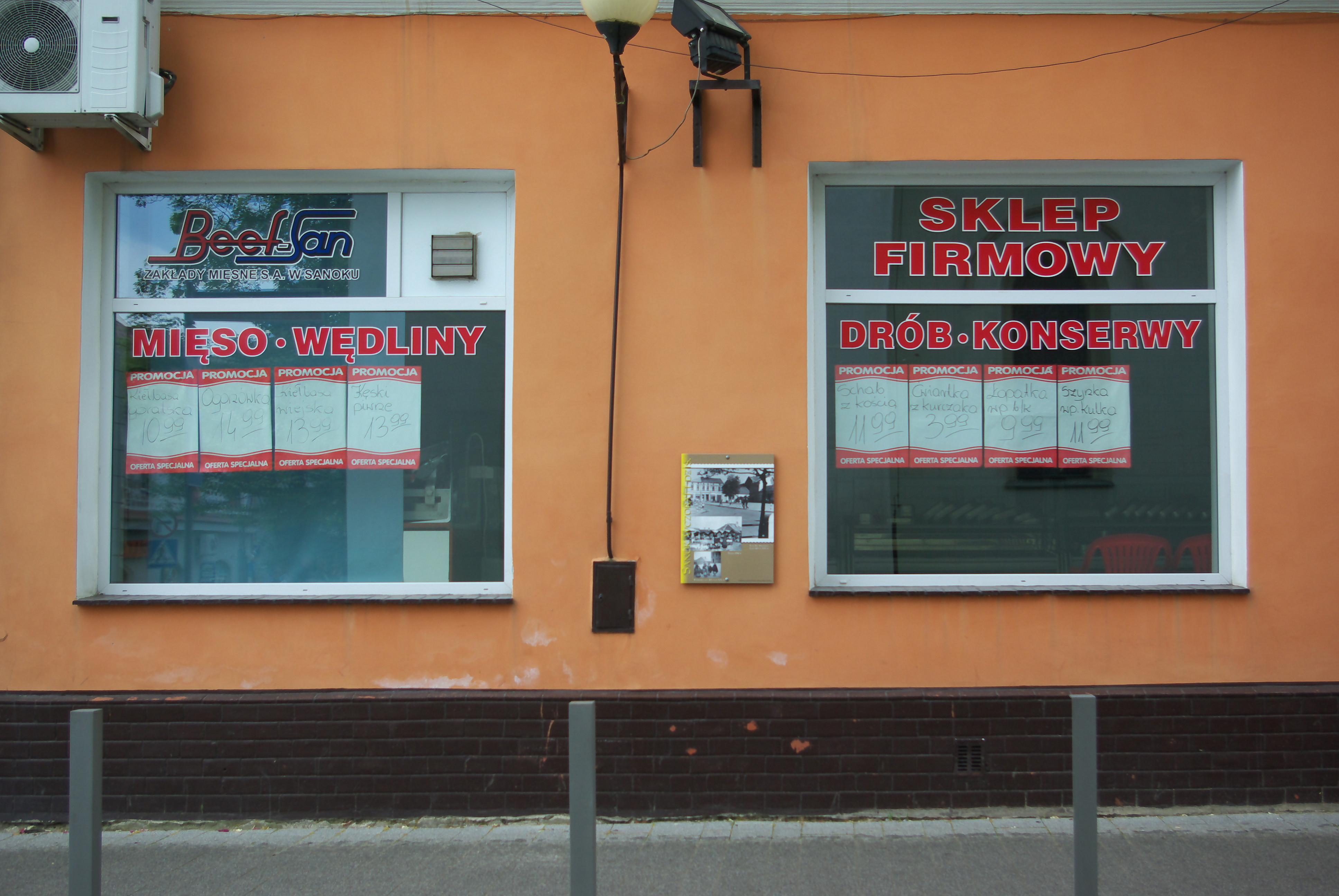 Kamienica przy ulicy Grzegorza z Sanoka 10-12 w Sanoku. Sklep Beef-San